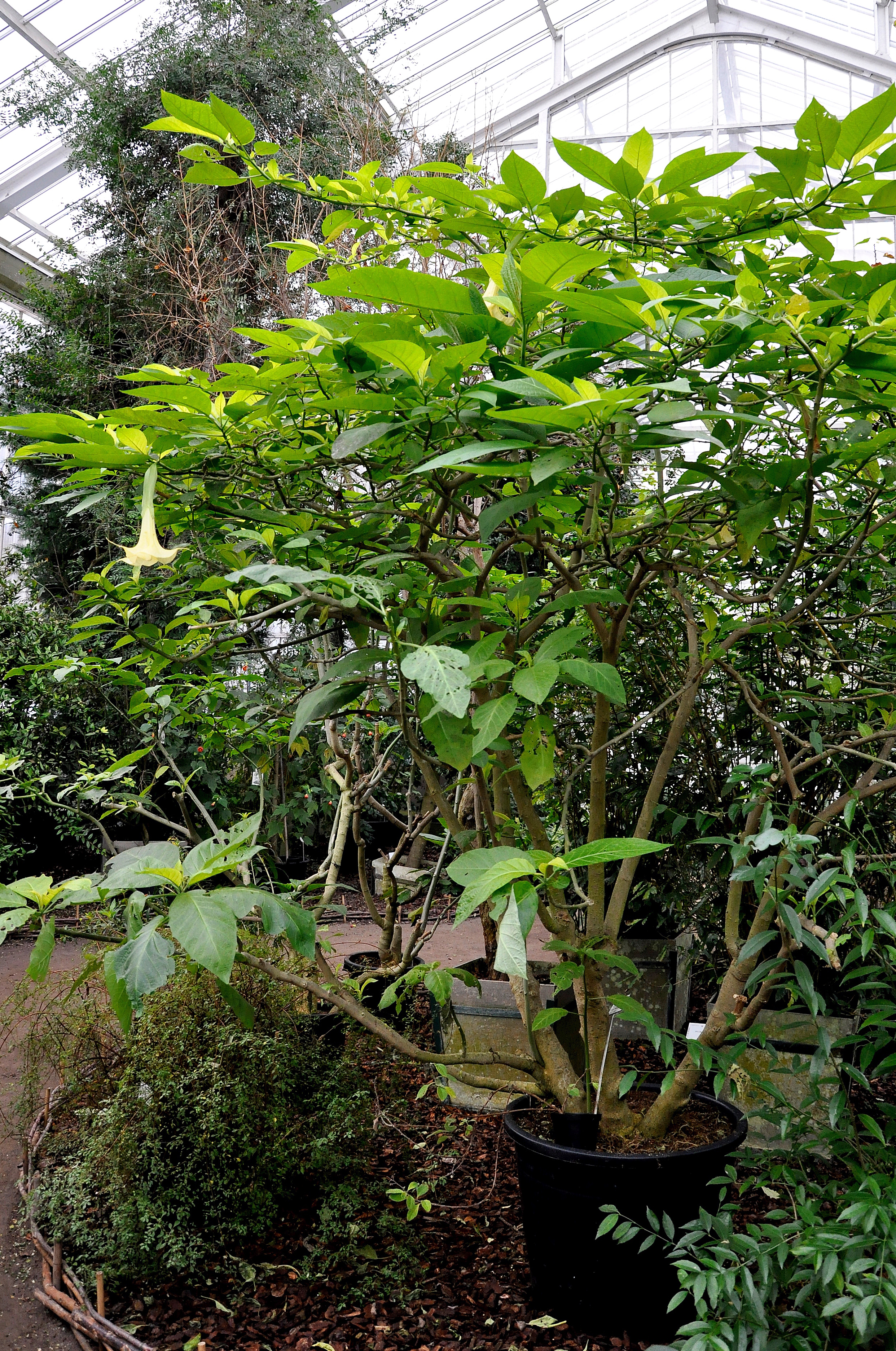 Brugmansia aurea (Solanaceae) in de Nationale Plantentuin van België te Meise